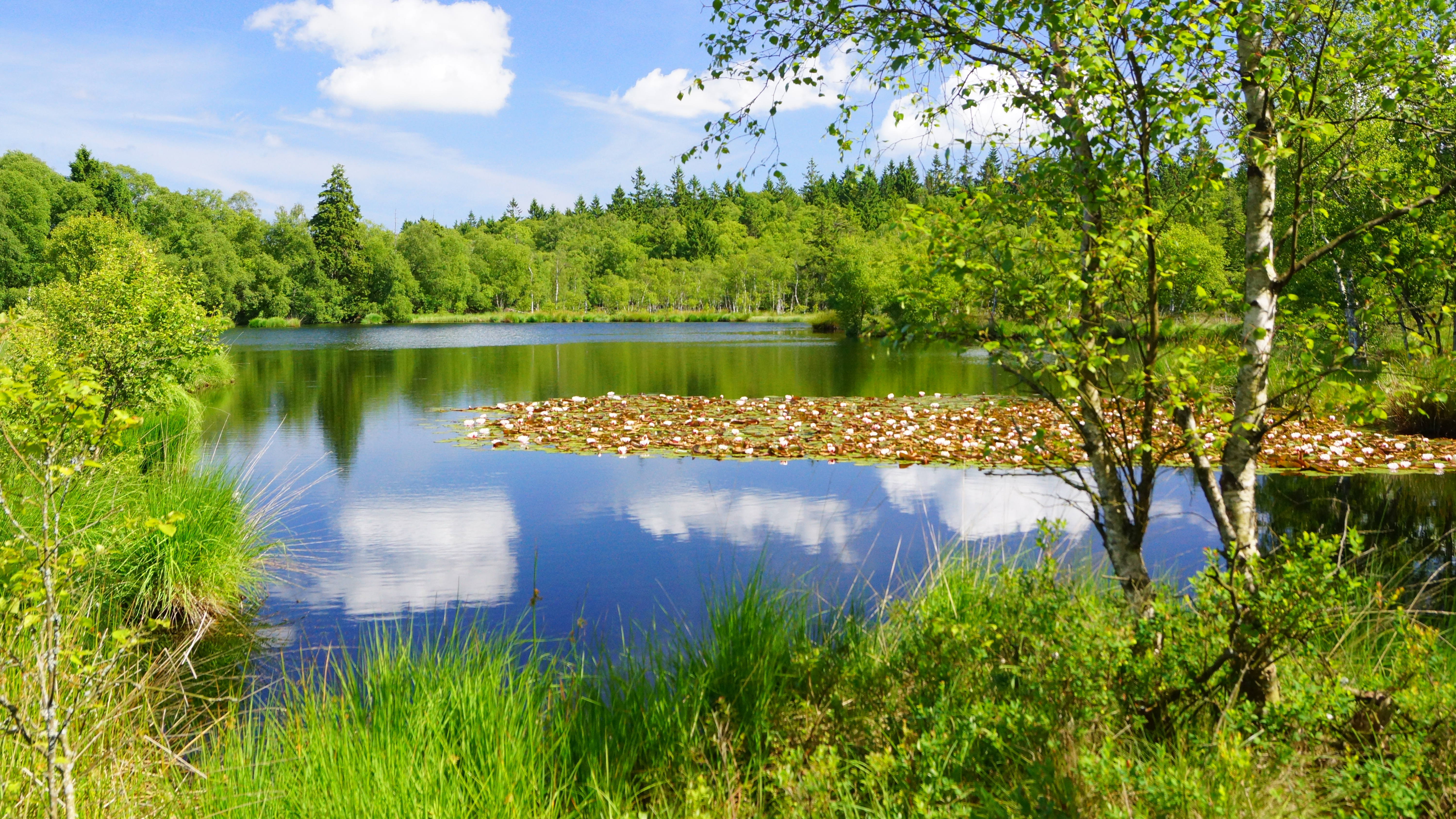 Løvenholm Skov, Tørvemose